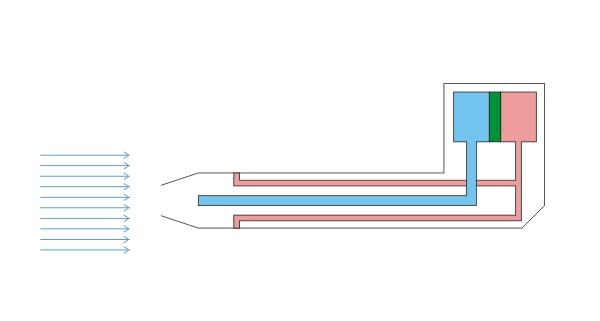 pitot tube